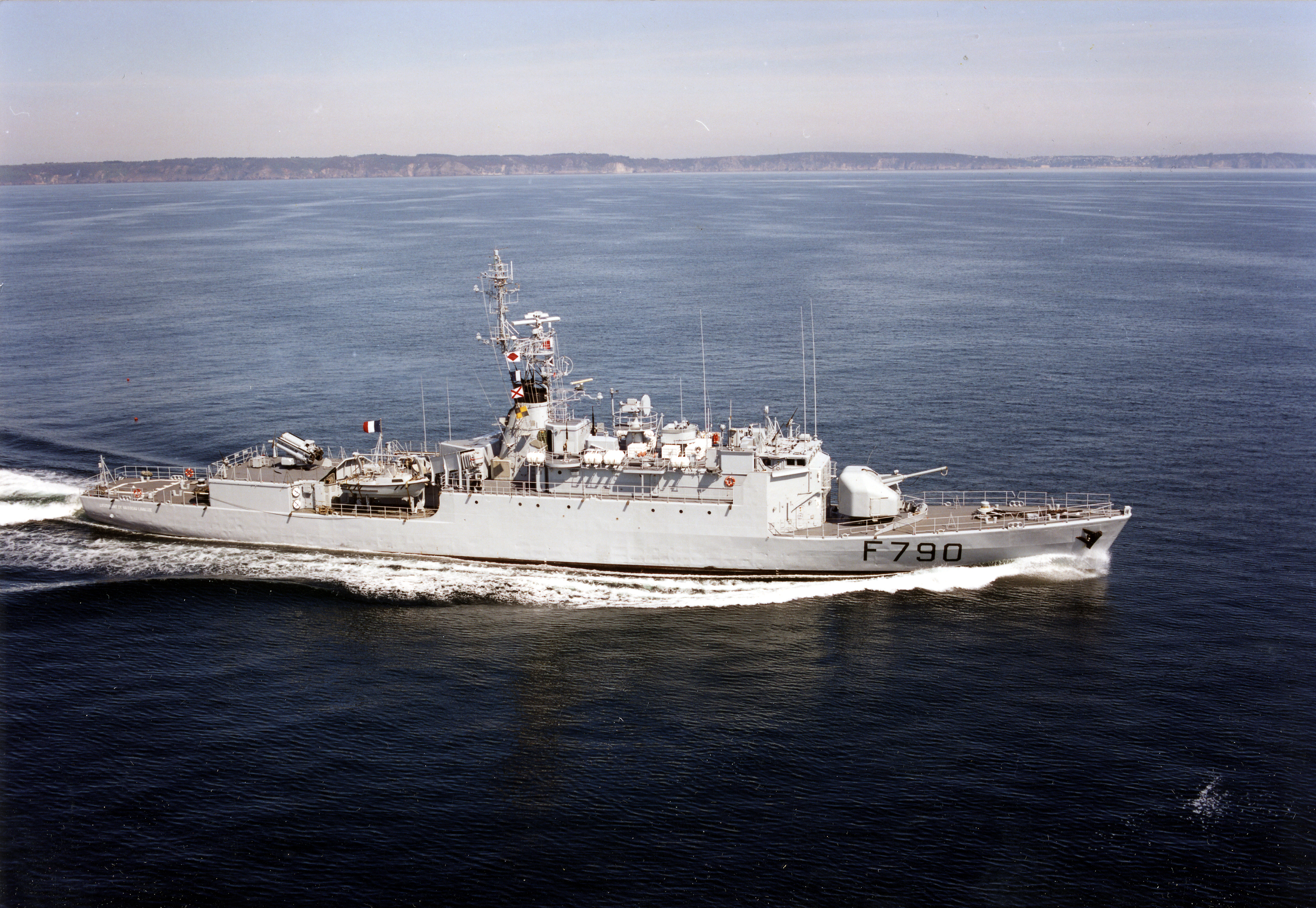 L'aviso Lieutenant de vaisseau Lavalée.